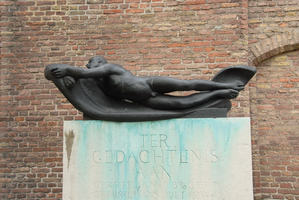 Monument bij de St. Catherijnekerk ter nagedachtenis aan drie gefusilleerde Briellenaren, waaronder verzetsman Gert Jan van den Boogerd. Hij werd op 25 juli 1944 gefusilleerd. Gemaakt in 1949 door Hubert Cornelis Maria van Lith (1908 -1977) in Brielle/The Netherlands Onderaan de voet zijn enkele dichtregels van Albert Verweij uitgehouwen: 'Boven het leed, boven de tijd verrijst het onvervaard gemoed dat weet dat iedere mensheid lijdt maar draagt zijn leed en doet wat moet'.